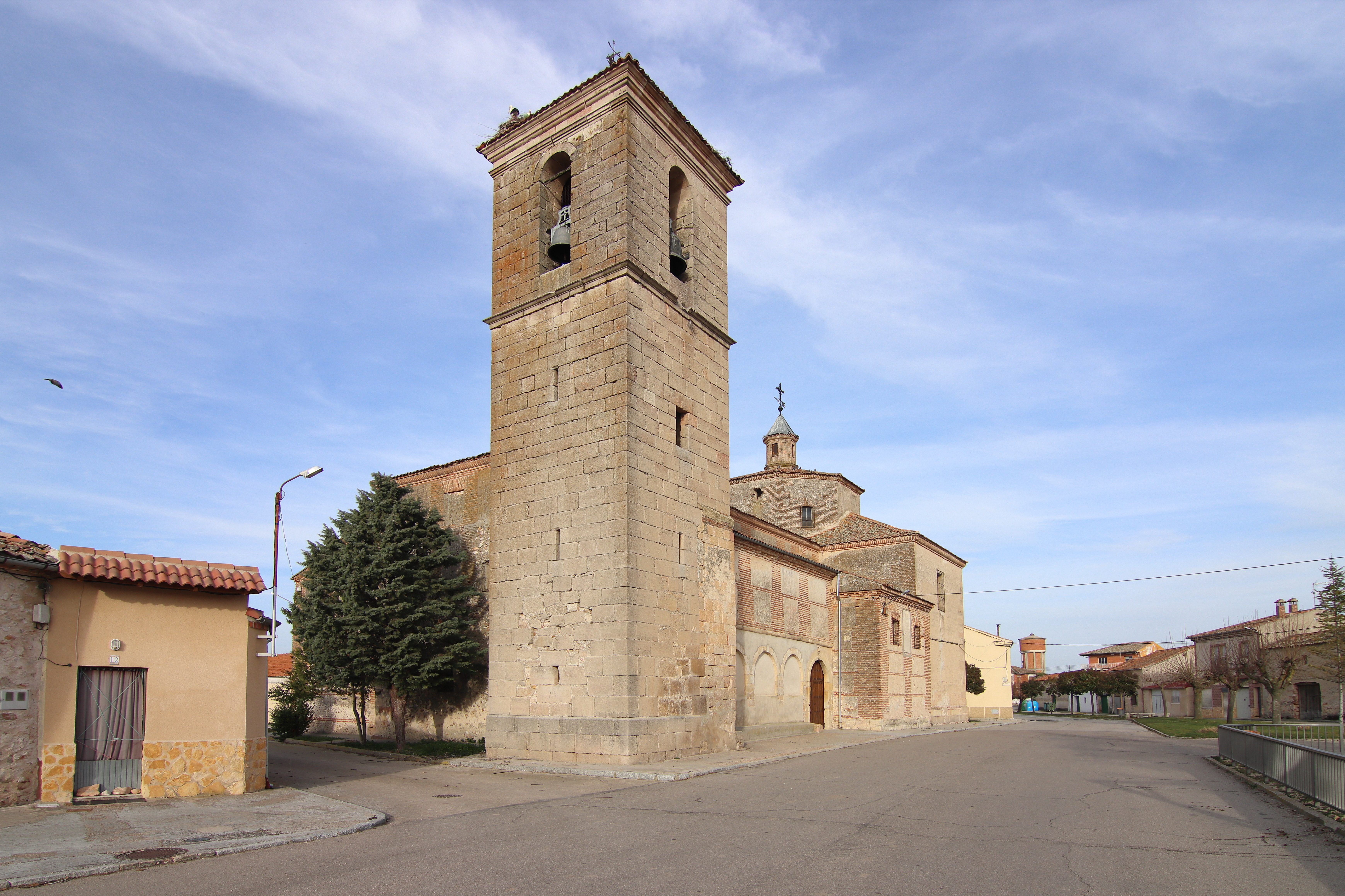 Iglesia de San Pedro Apóstol, Sauquillo de Cabezas, torre y fachada sur